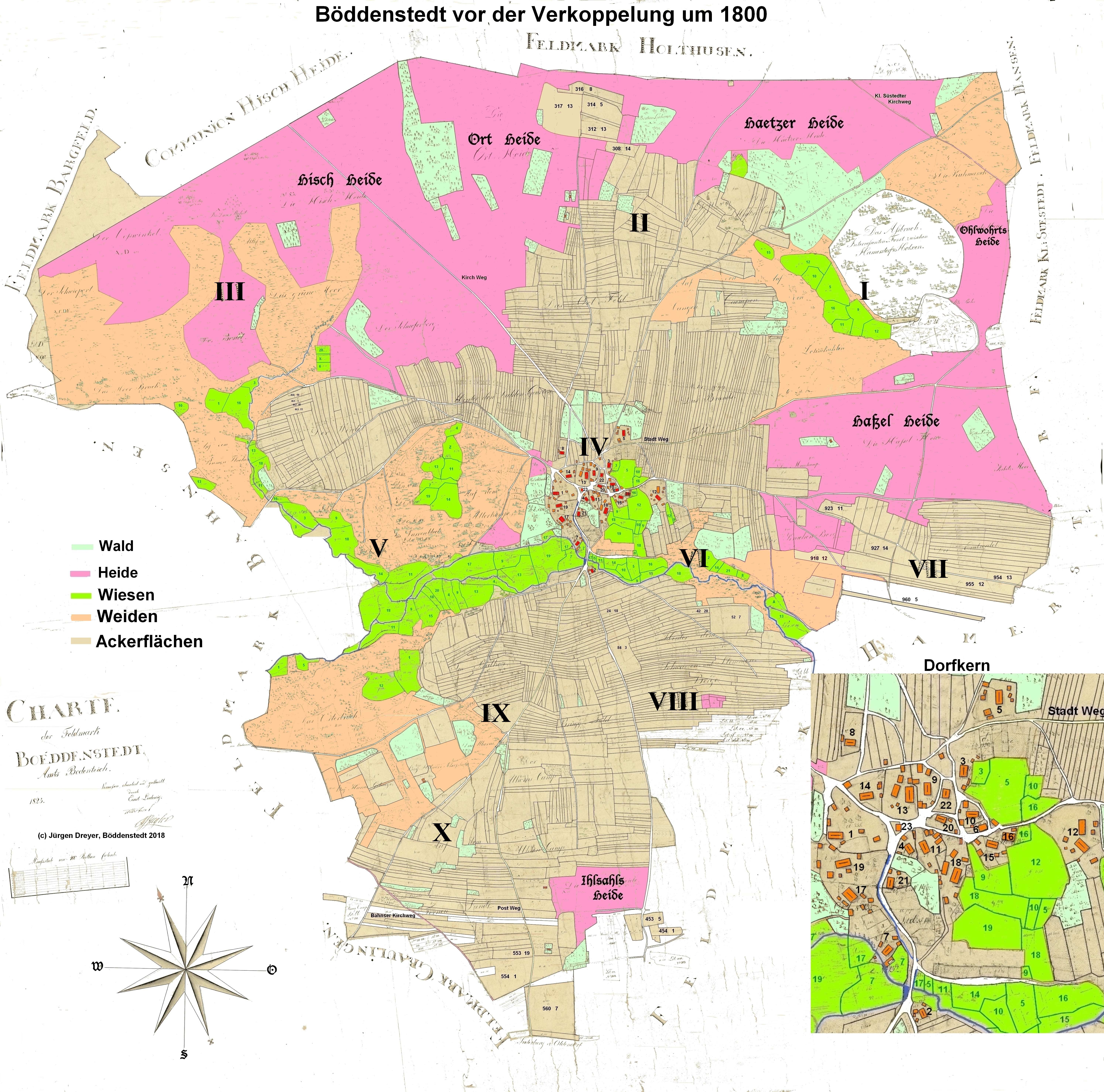 Böddenstedt vor der Verkoppelung